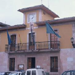 Ayuntamiento asturiano de Parres (España)